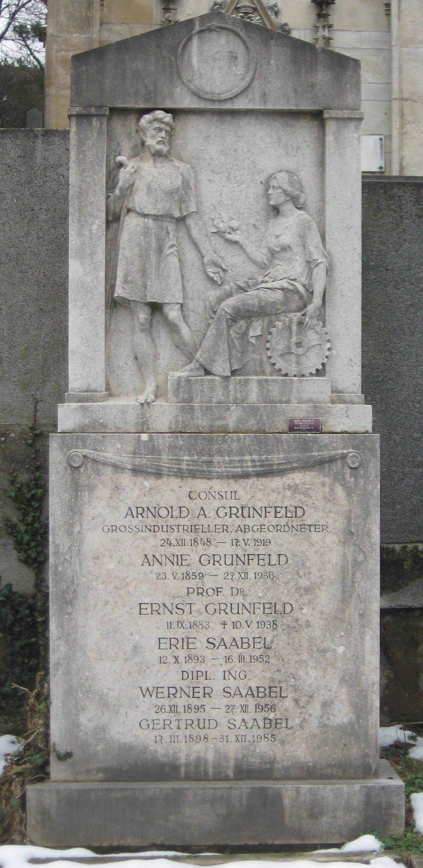 Das von Richard Kauffungen entworfene Grabdenkmal der Familie Grünfeld am Hietzinger Friedhof (Gruppe 7, Nr. 6) in Wien. Am 17. April 1951 wurde in diesem Grab auch der Wirtschafts- und Sozialwissenschaftler Ernst Grünfeld (1883–1938) beigesetzt